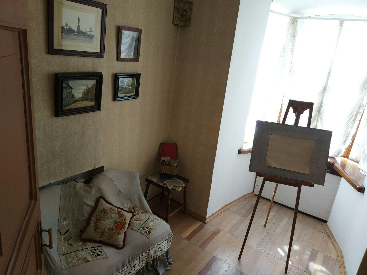 Комната Марии Чеховой в Доме-музее А. П. Чехова на Садовой-Кудринской